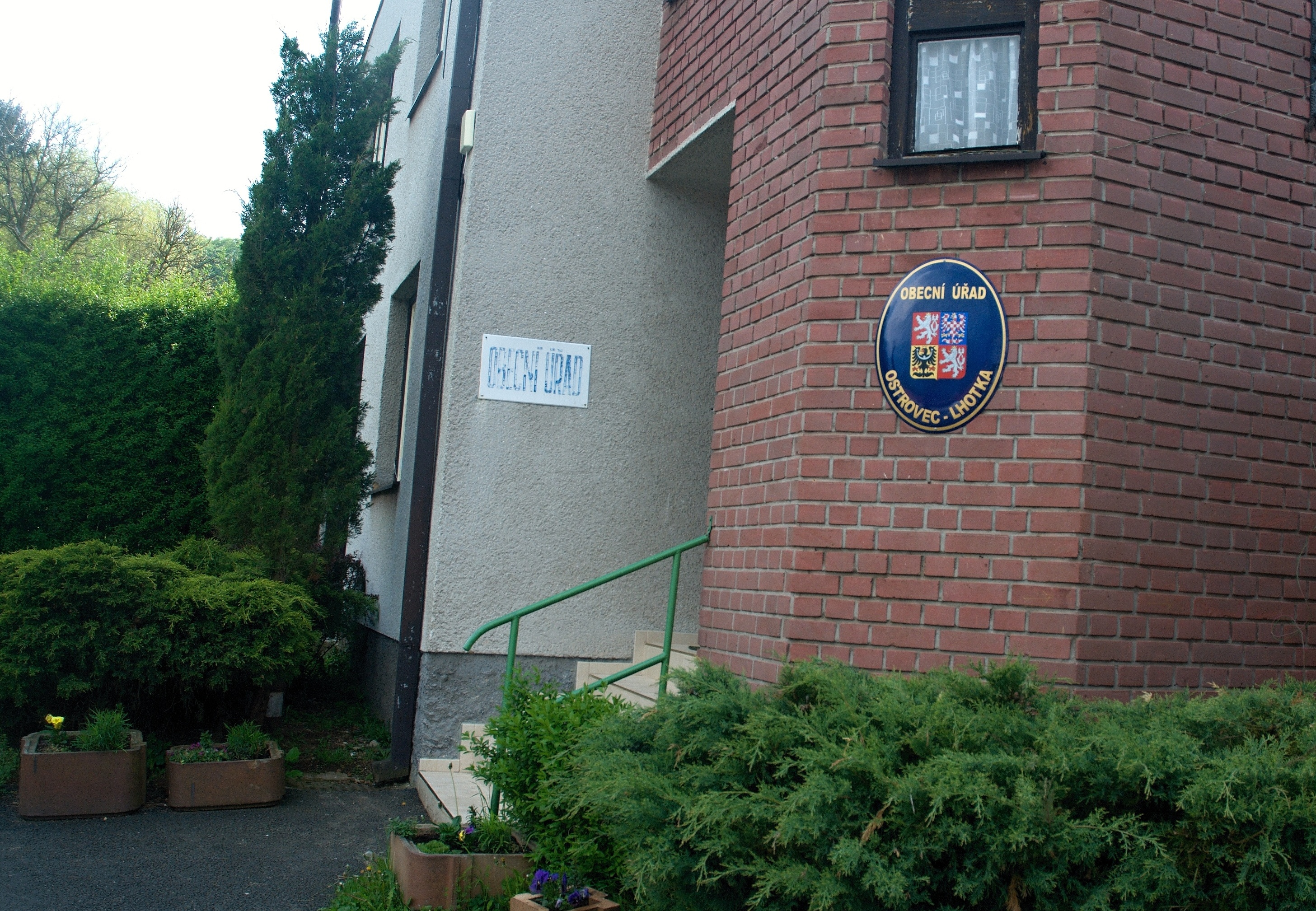 obecní úřad